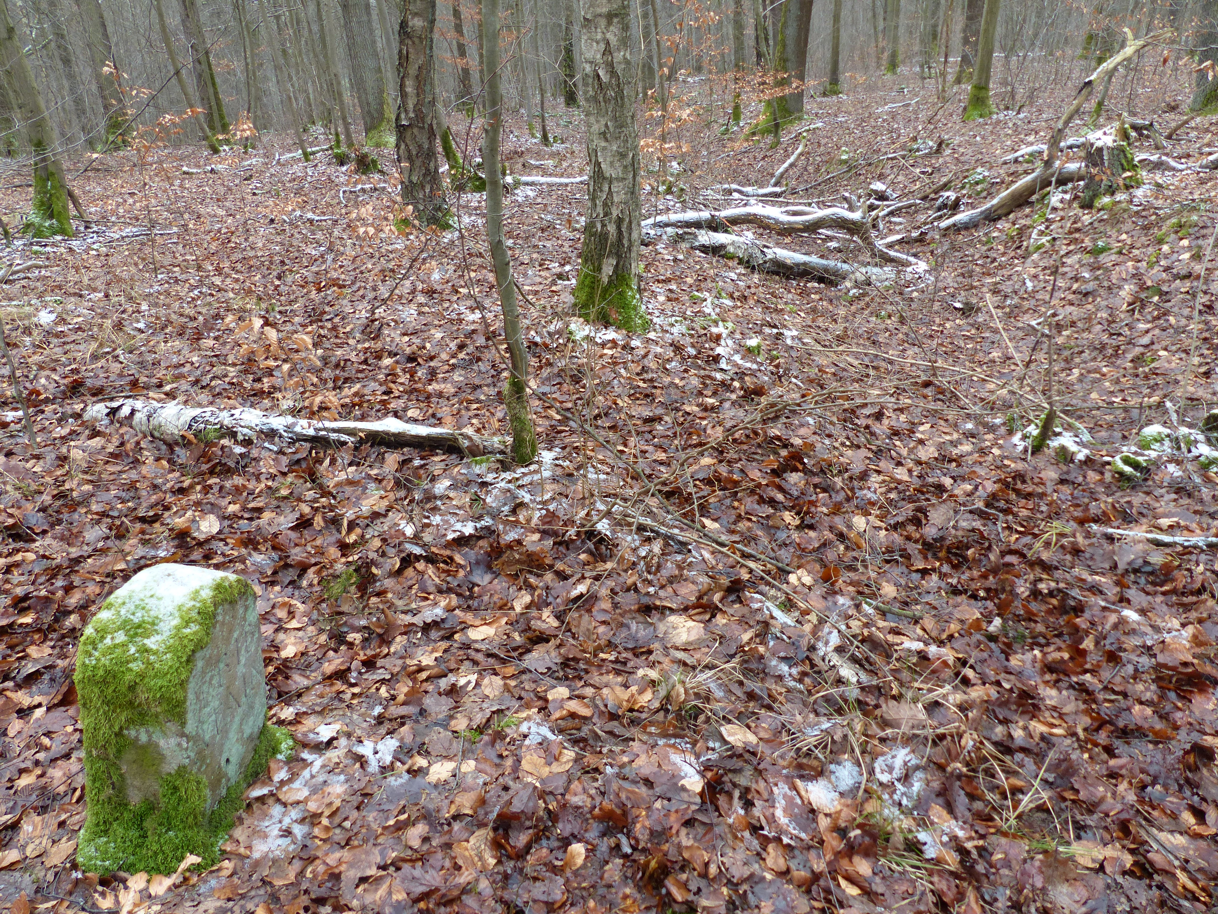 Reste eines spätmittelalterlichen Triebweges im Steigerwald, Grenzsteine und ausgetretener Weg